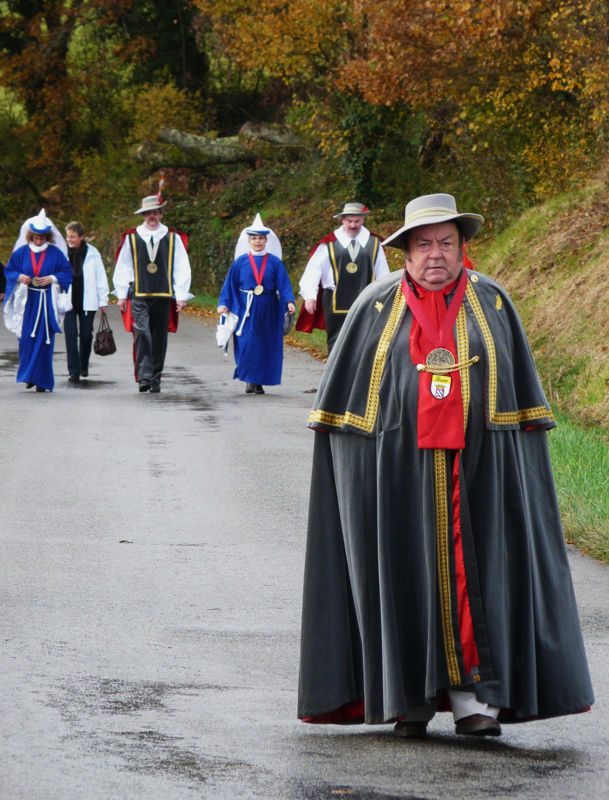 La confrérie de la dinde de Licques arrive. Foire aux dindons de Varaignes, Dordogne, France.